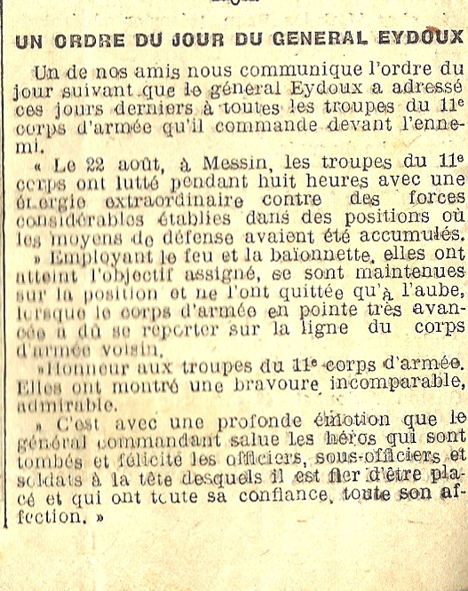 Attaque Française à Maissin 1914